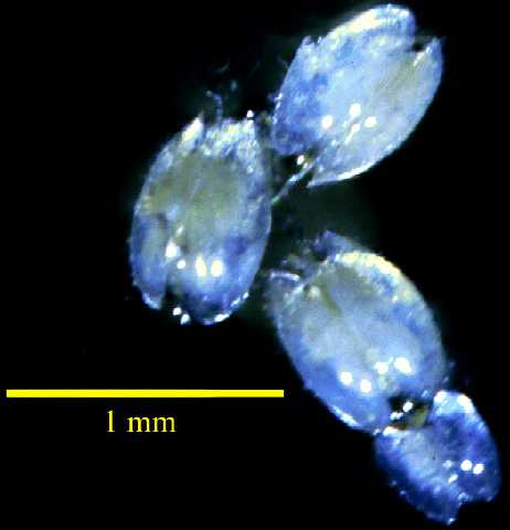 Ostracoda